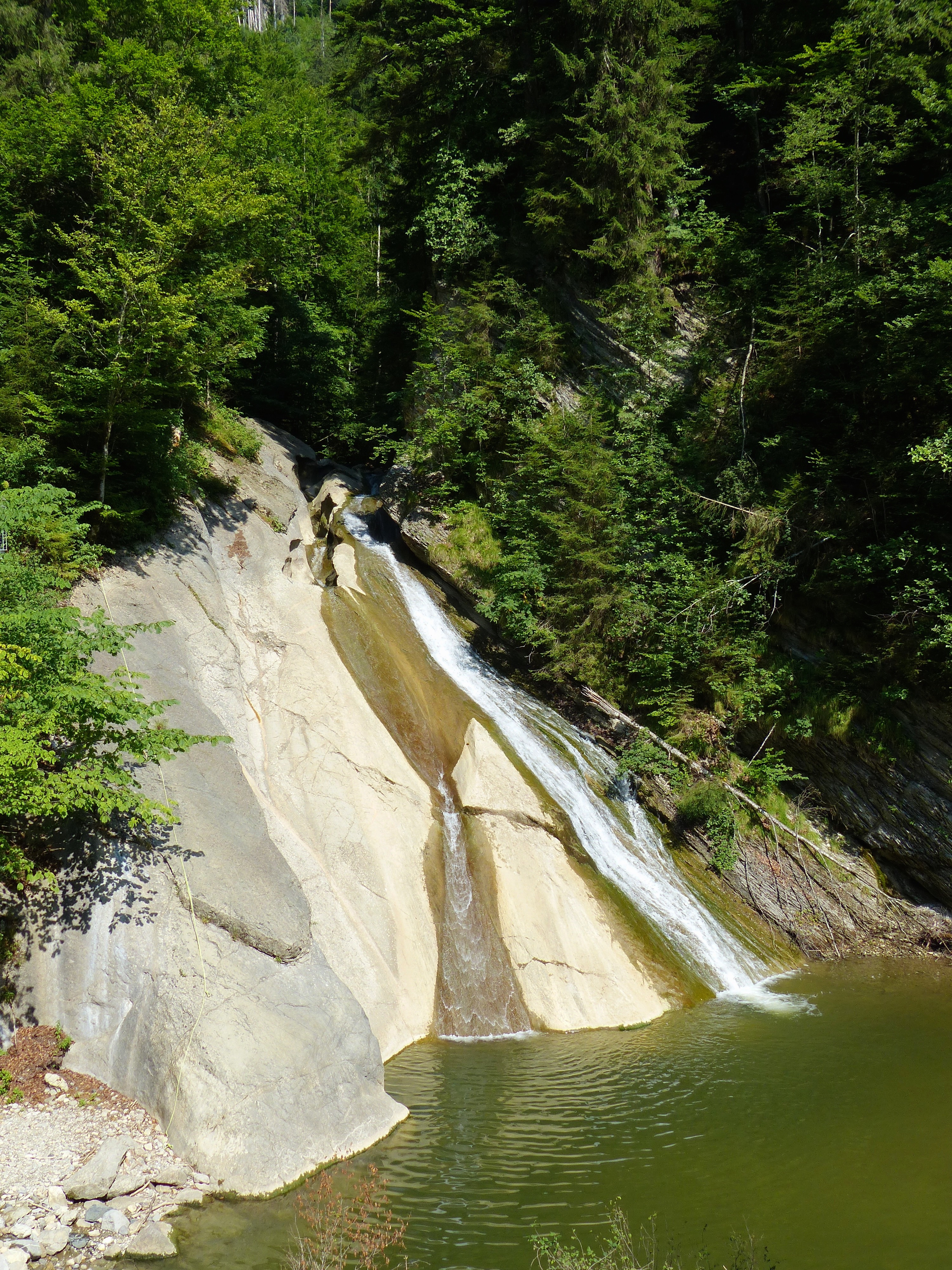 WikiProjekt Landstreicher: Schleierfälle in der Starzlachklamm